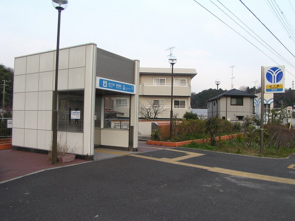 Exit 2 of Maioka Station, Yokohama Municipal Subway Blue Line, Totsuka-ku, Yokohama, Japan